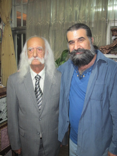 انجمن ادبی ناصر خسرو1